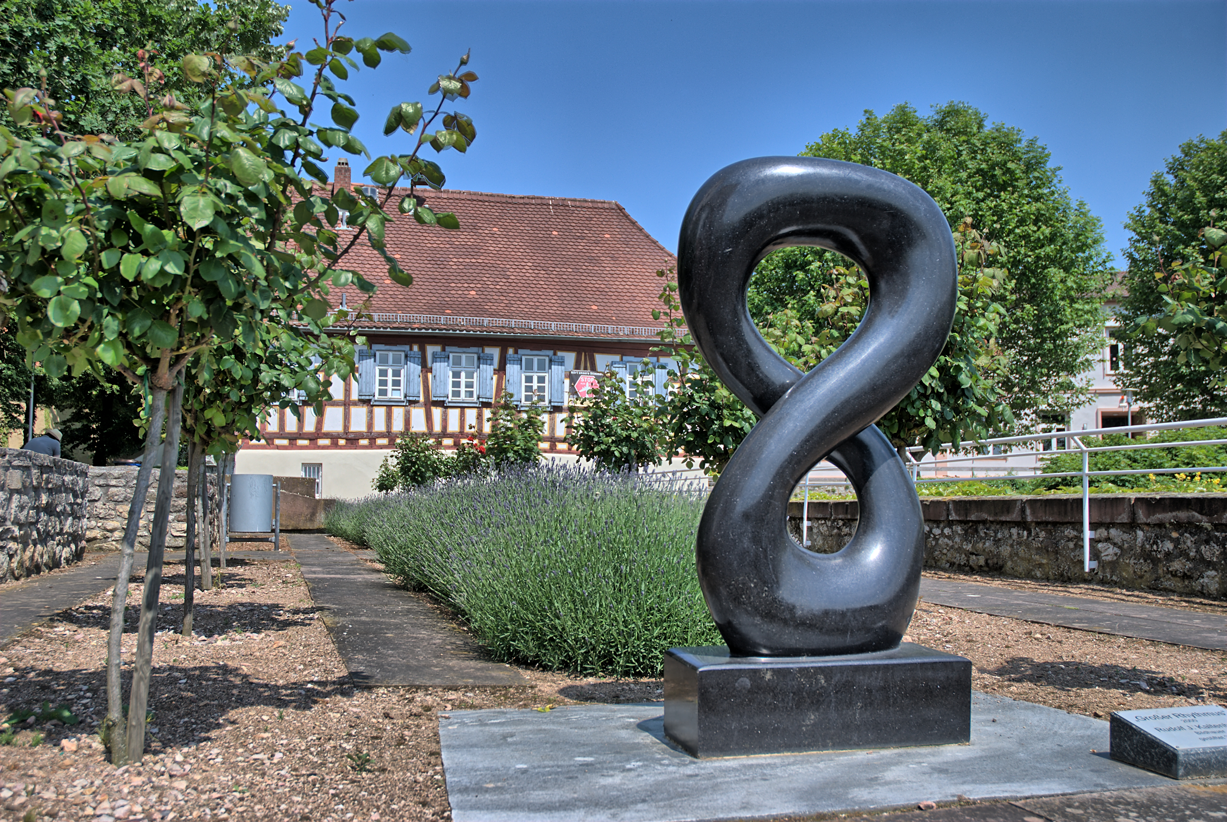 Skulptur Großer Rhythmus (2000) von Rudolf J. Kaltenbach. Schwedischer Schwarz-Gabbro, 153 x 90 x 25 cm. Standort: Pfarrkirche St. Peter und Paul, Hochheim am Main (zuvor als Leihgabe im Hummelpark aufgestellt, 2006 der Katholischen Kirche gestiftet)